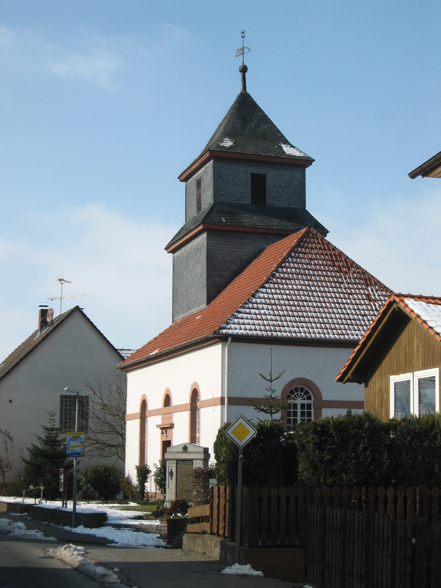 Church in Niederlistingen, Breuna, Hesse, Germany.